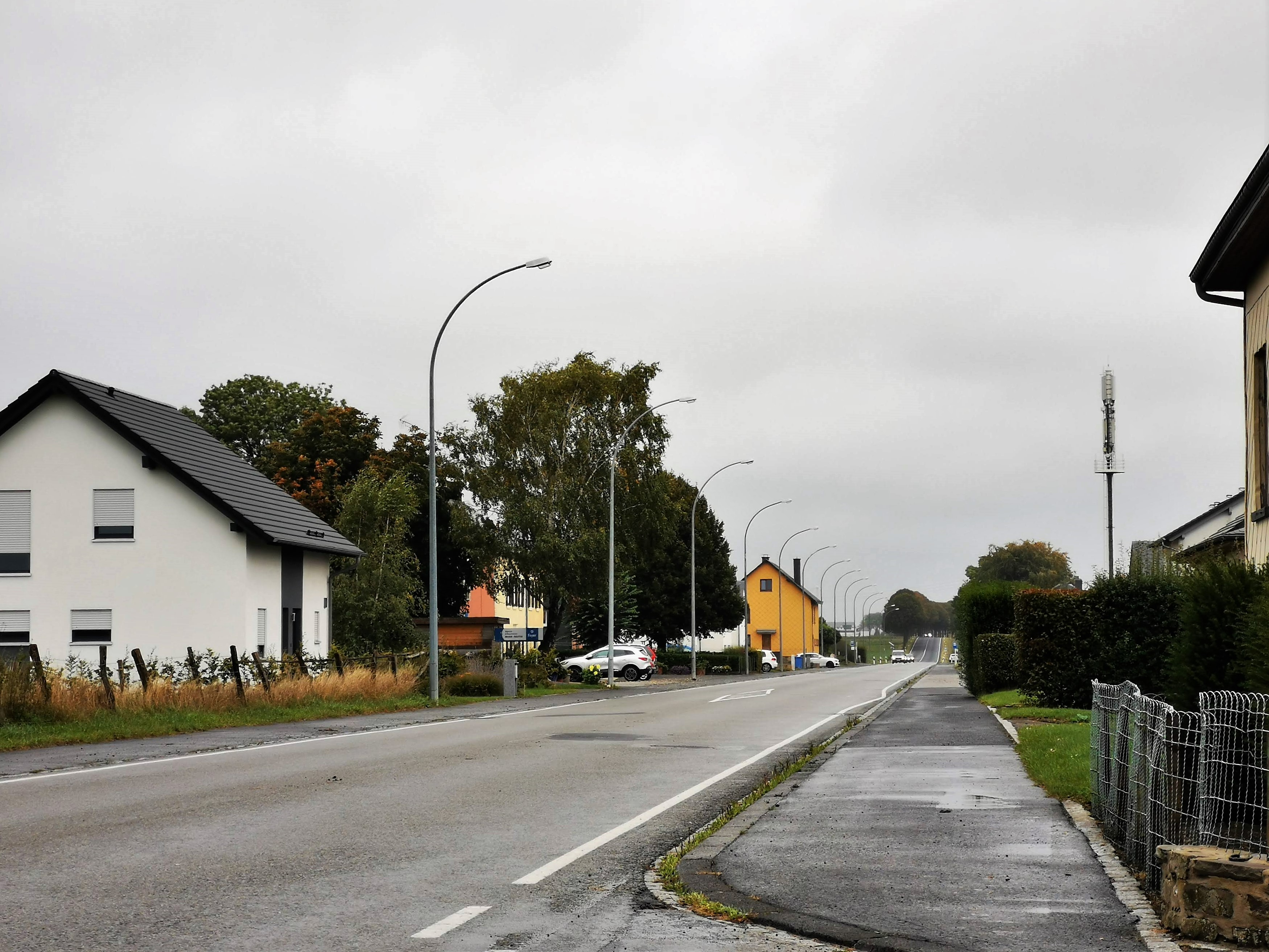 Hamiville, commune de Wincrange.